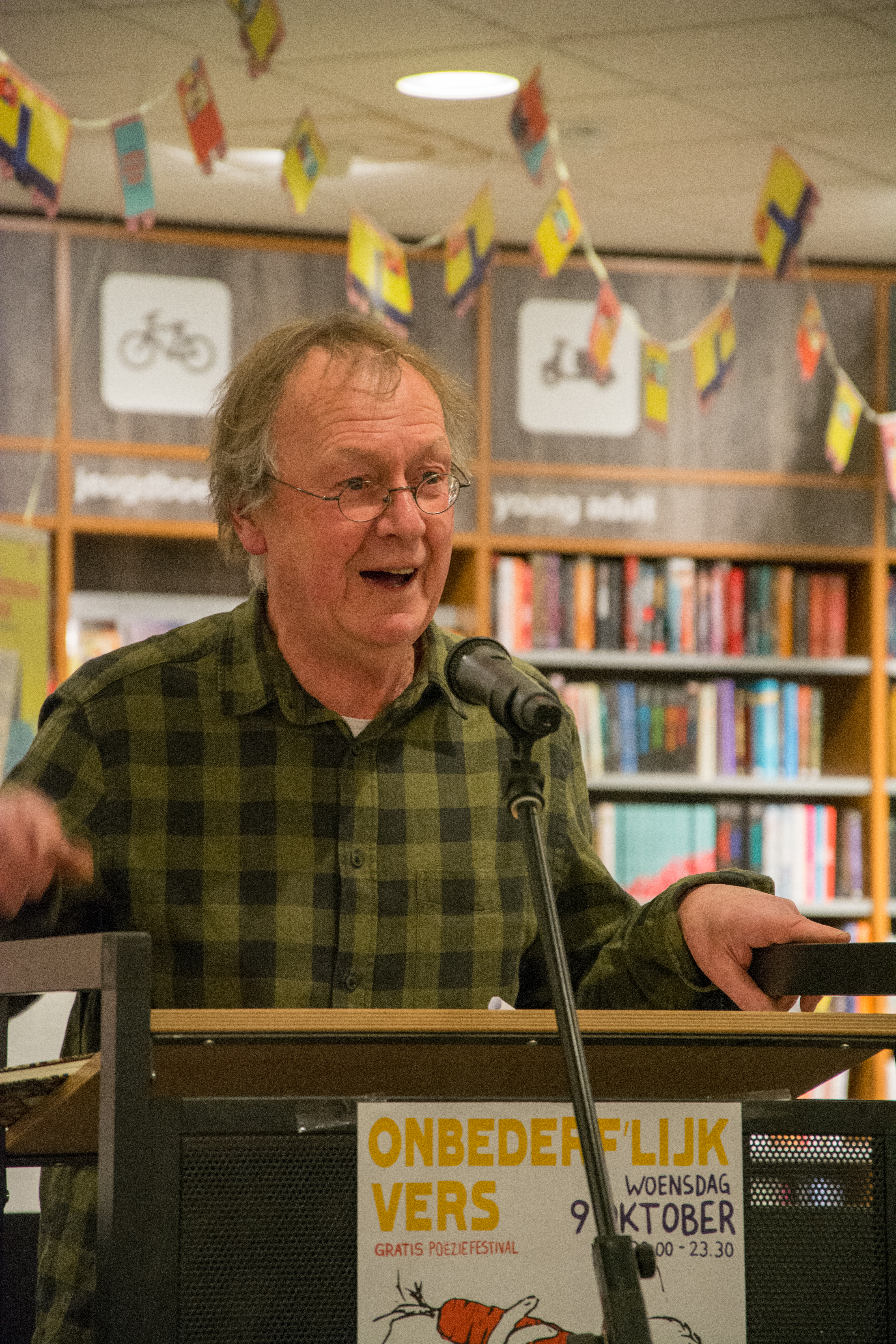 Lévi Weemoedt op het Onbederf'lijk Vers festival in Nijmegen